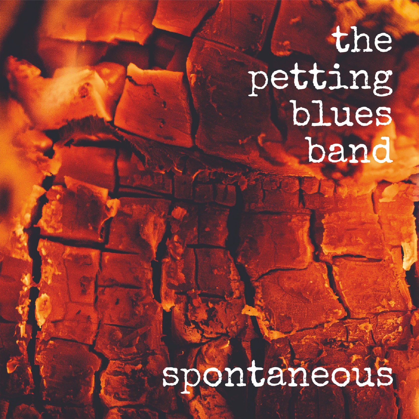 Омот другог студијског албума